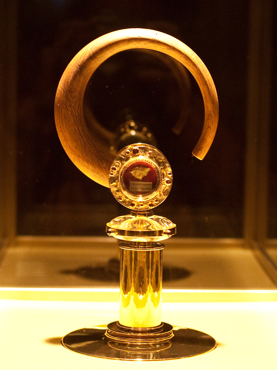 Reliquar des Kardinals von Galen